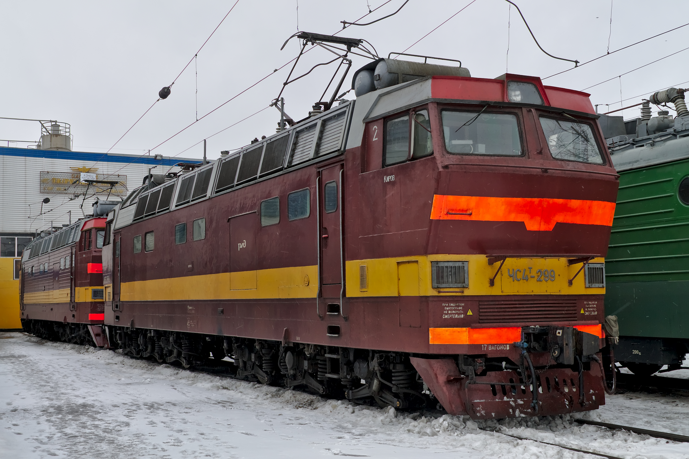 ЧС4Т-299, депо Владимир. см. фото 637258 в альбоме автора